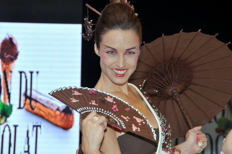 Natasha St-Pier au défilé de mode du salon du chocolat